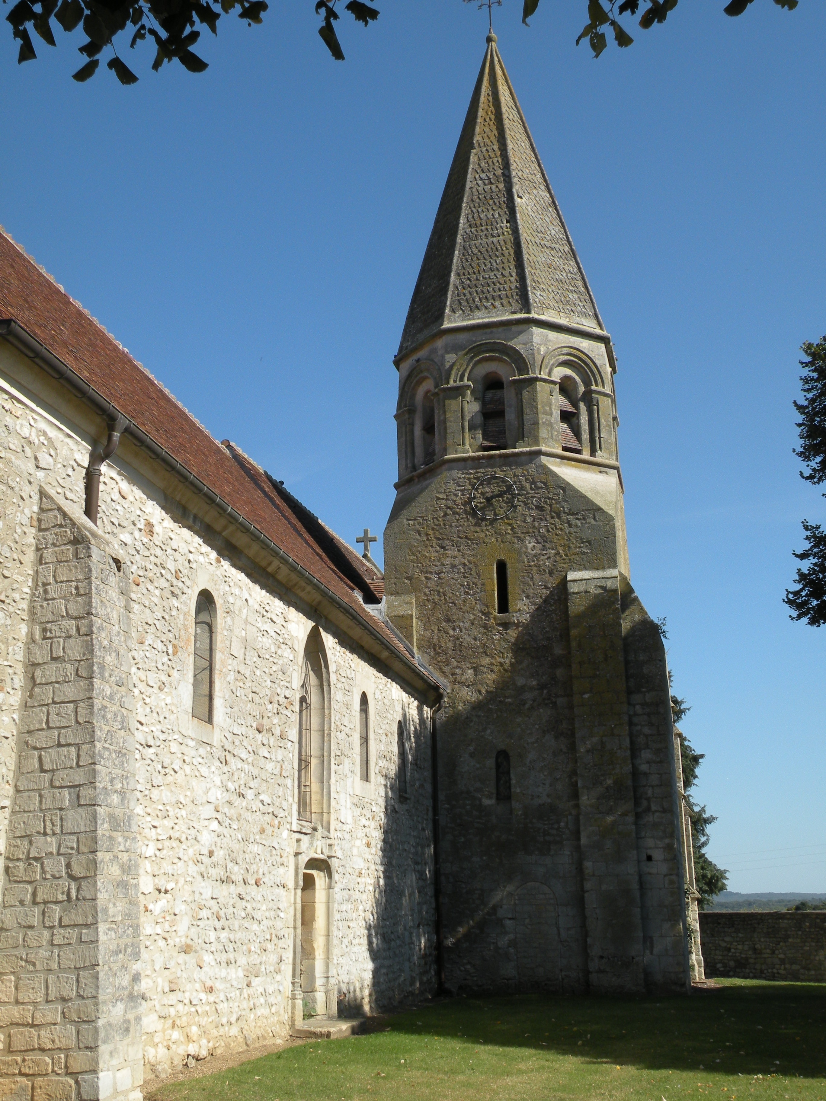 Église Saint-Martin de Lierville